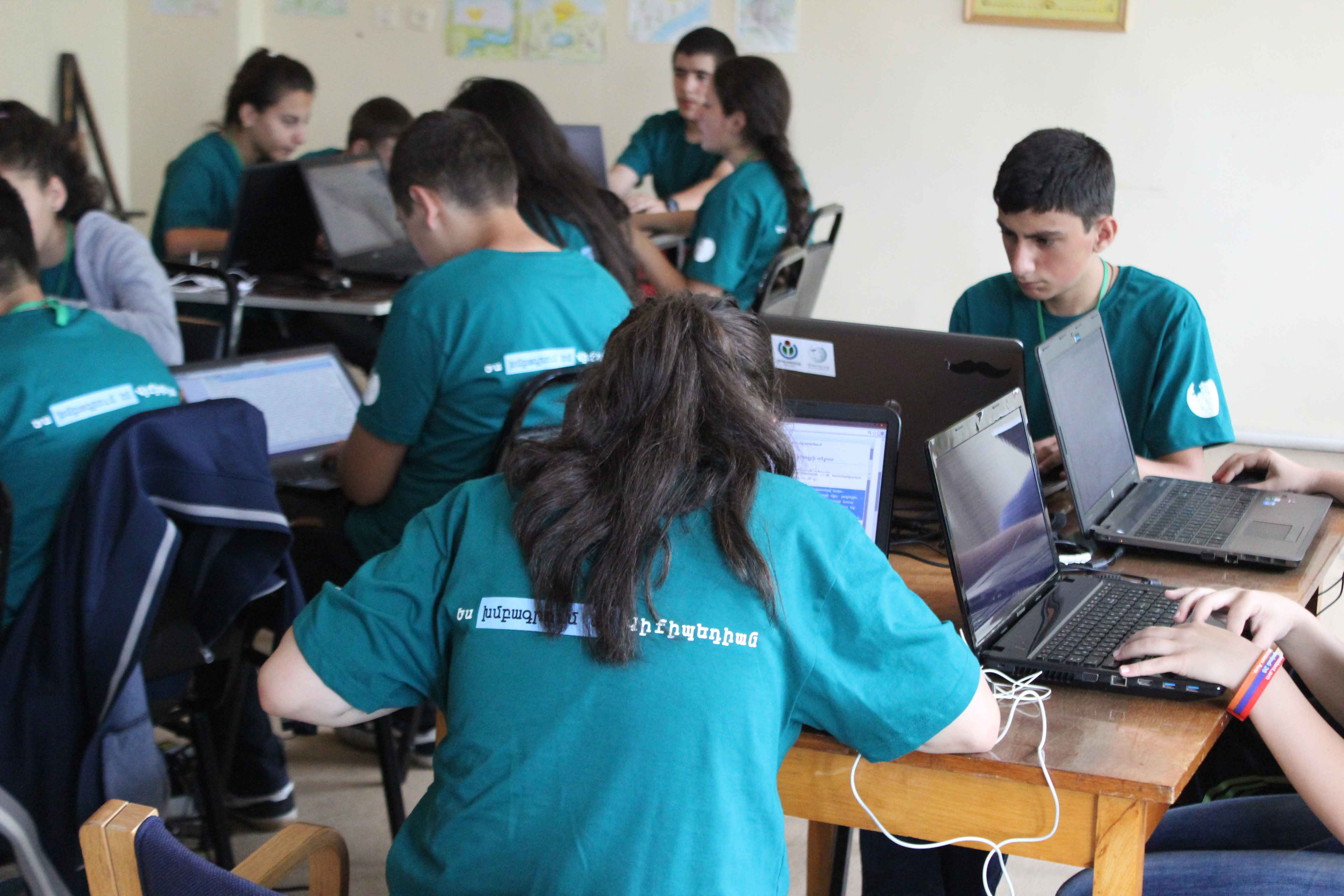 Վանաձորի Վիքի Ճամբարի առօրյայից